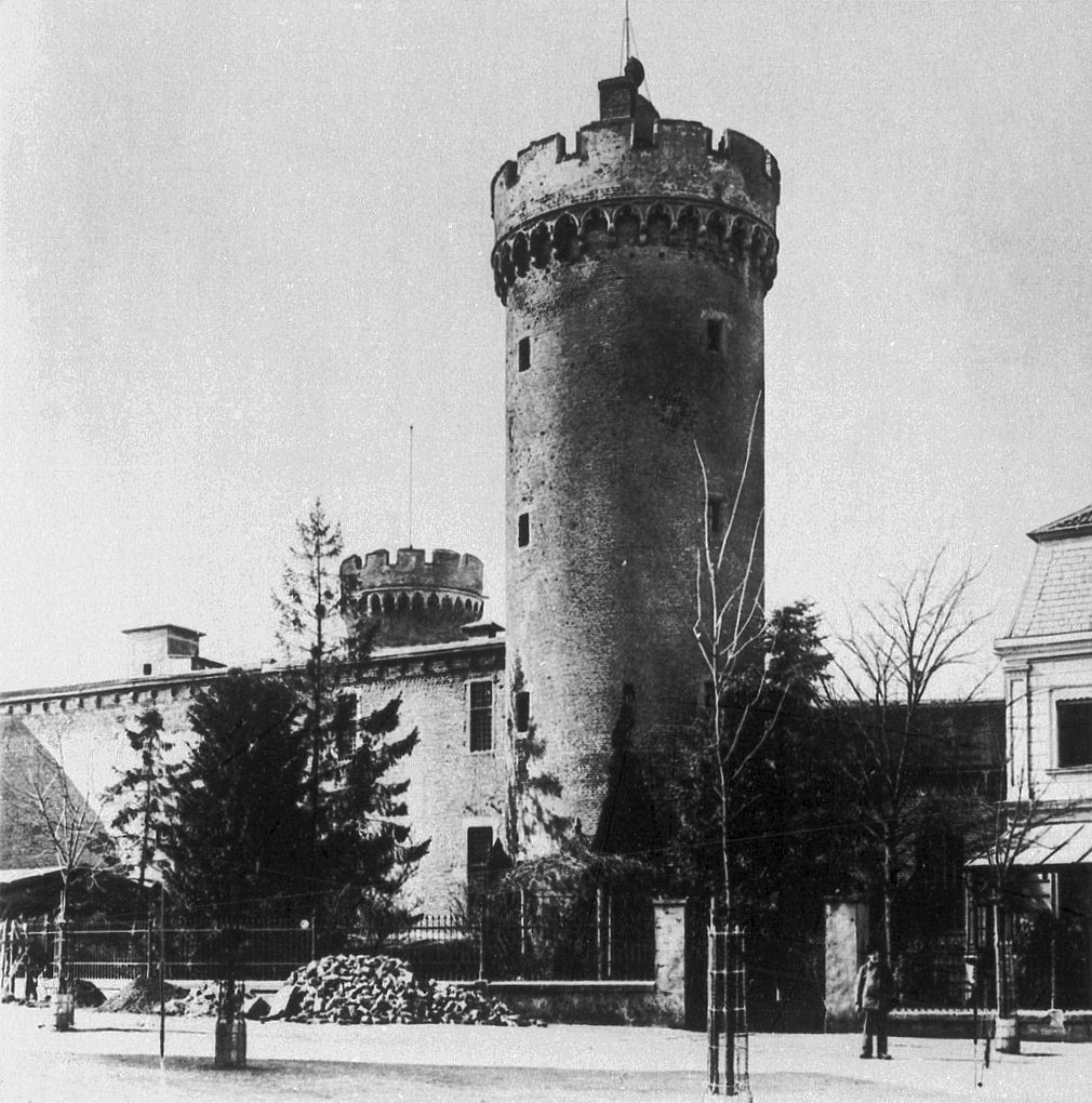 Die Ostseite der Burg Zülpich am Ende des 19. Jahrhunderts